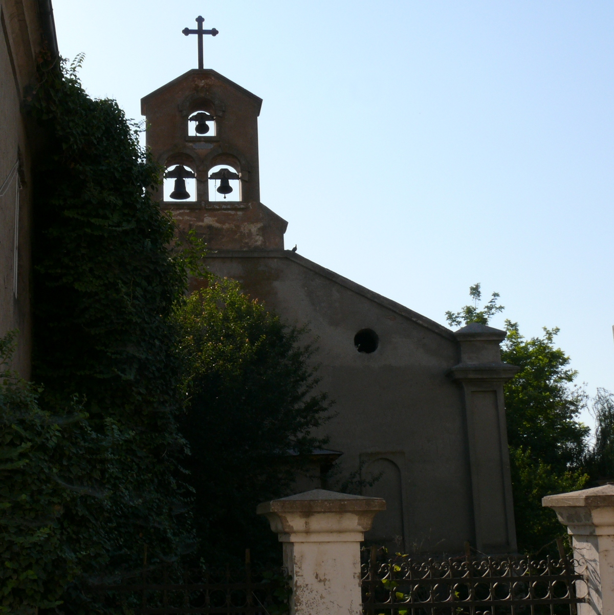 Biserica catolică "Sf. Nicolae"